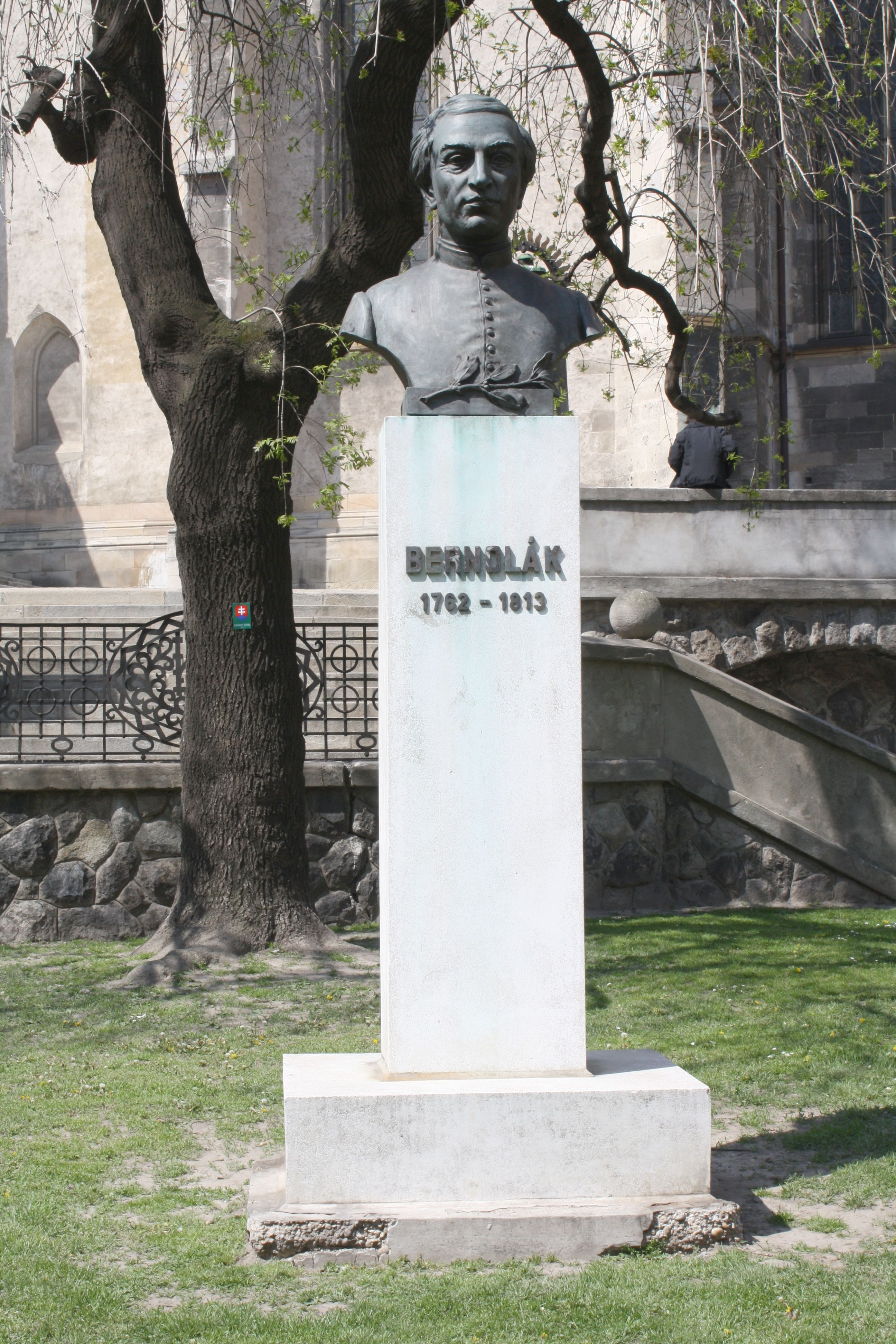 Denkmal von Anton Bernolák in BratislavaMonument of Anton Bernolák in Bratislava